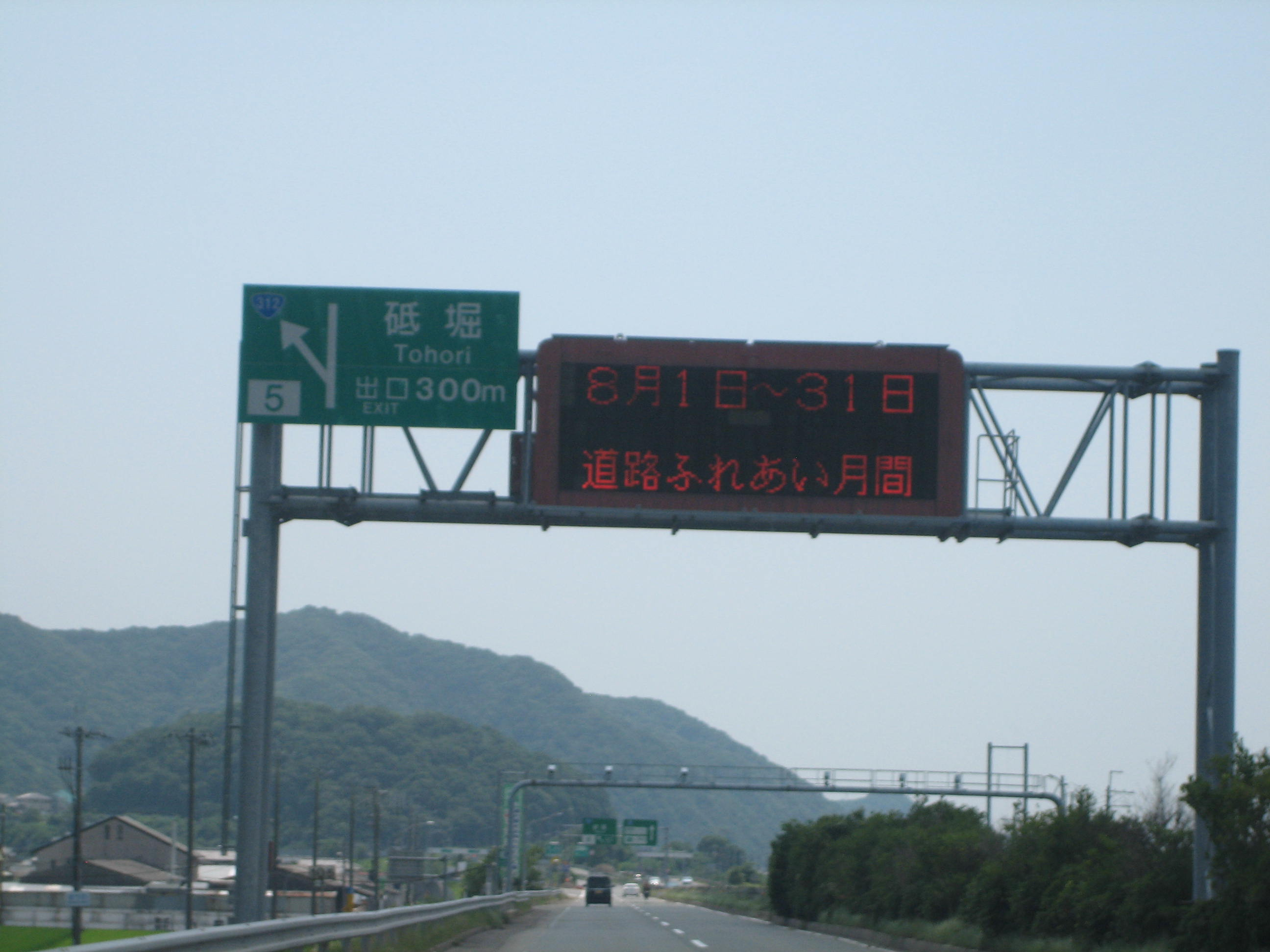 砥堀IC